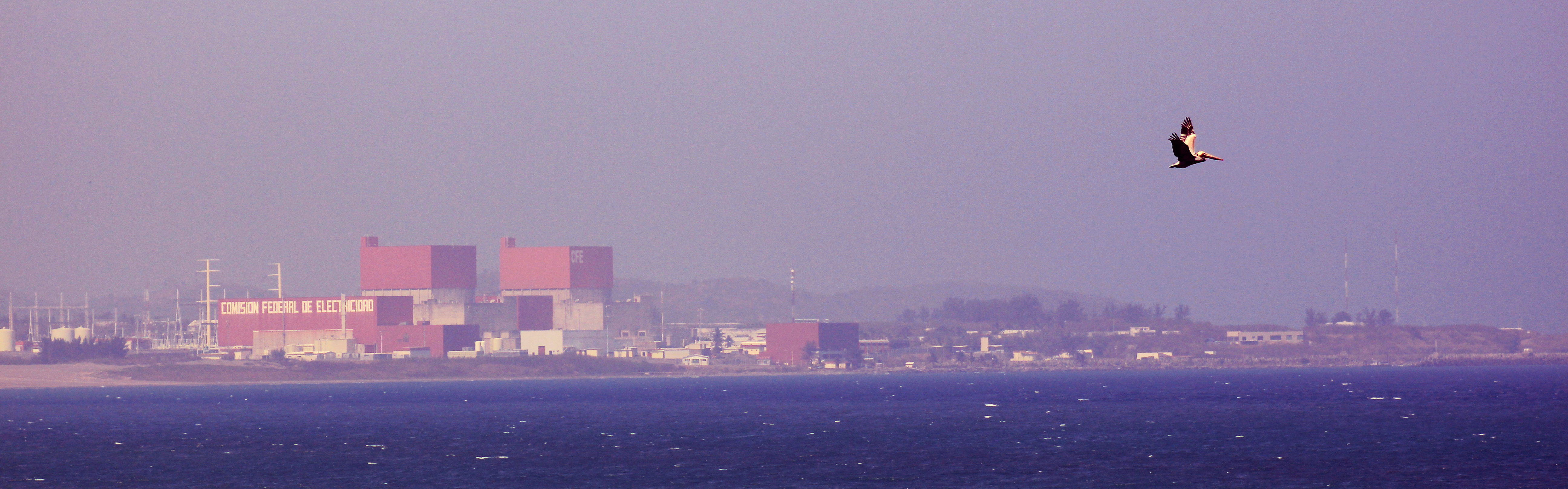 Panoramica de la Central Nuclear laguna verde con el vuelo de un pelicano.